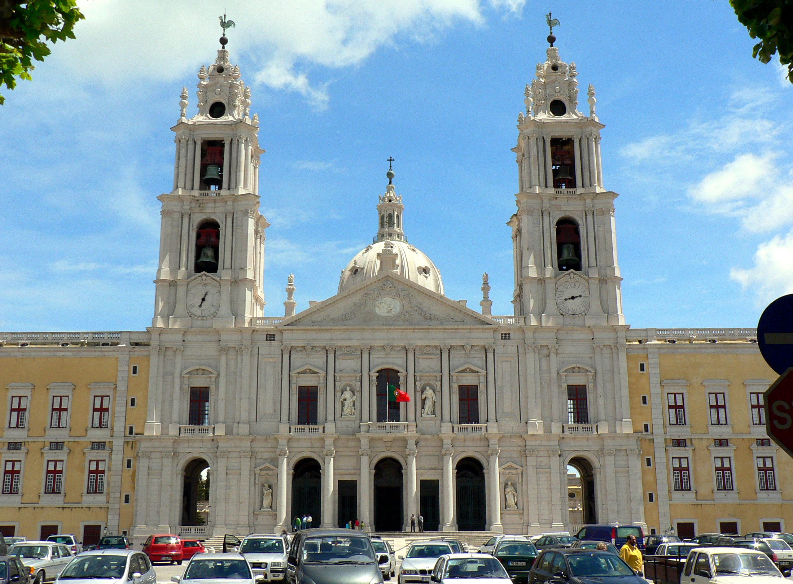 Palácio Nacional de Mafra